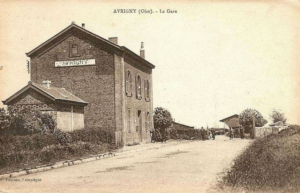 La gare côté cour.